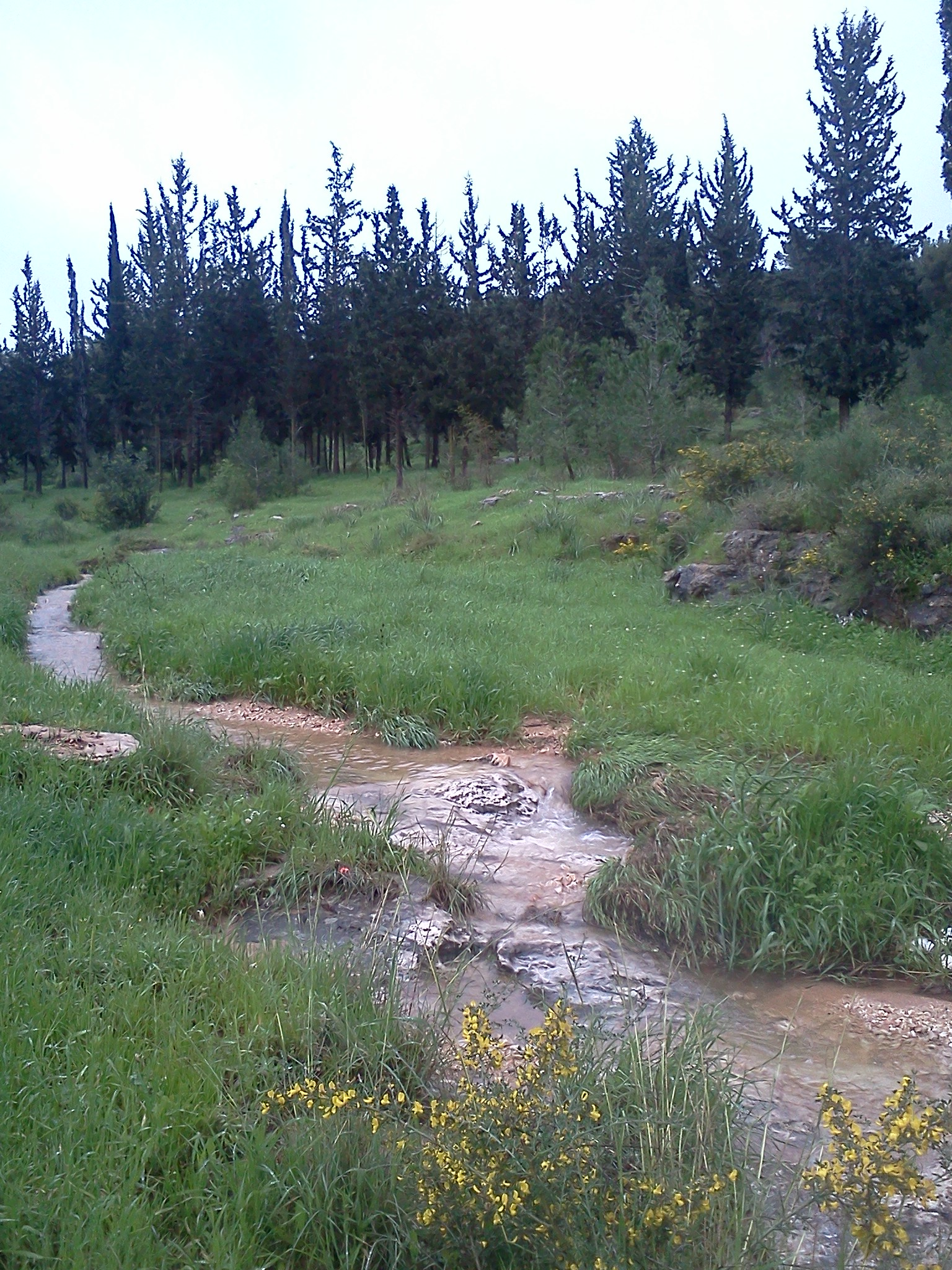 חלקו המרכזי של נחל נחשונים זורם לאחר גשם חורף 2012